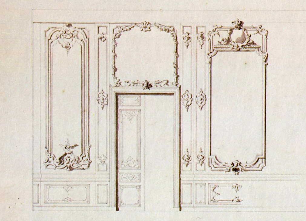 Skiss till interiör i Prins Gustafs audiensrum på Stockholms slott. Slott och herresäten i Sverige skriver på sida 81 (bildtext): "Kronprins Gustavs audiensrum, nu Sibyllas Inre salong, har kvar Hårlemans inredning med pilastrar och dörröverstycken".